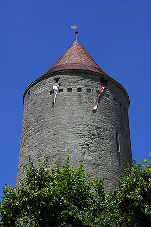 Title: La "Tour Boyer". Anciennement "Tour du comte Pierre". Technique: Ouvrage en molasse Dimensions: H 38 m Øext 12.7 Øint 9.6 m Country of origin: Switzerland Current location (city): Romont Current location (gallery)